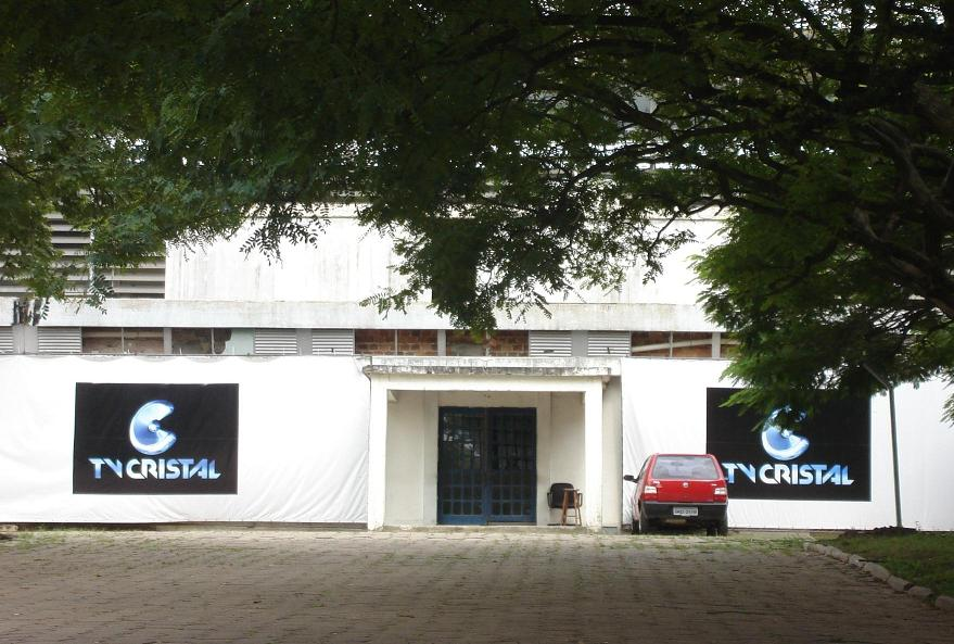 Sede da TV Cristal, canal 55 UHF de Porto Alegre, RS, em dezembro de 2007.